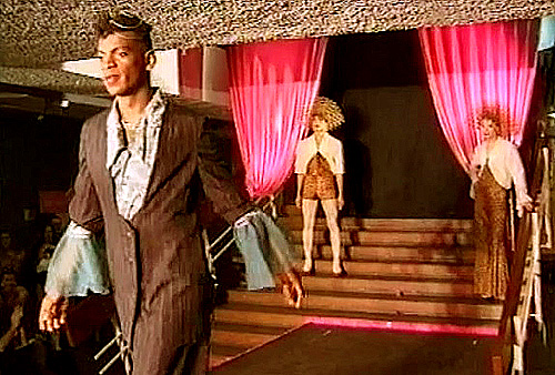 Akademie der Künste 1997: Schwule & Mode. BeV-Design: SlipSchlipse mit Tunten-Models.